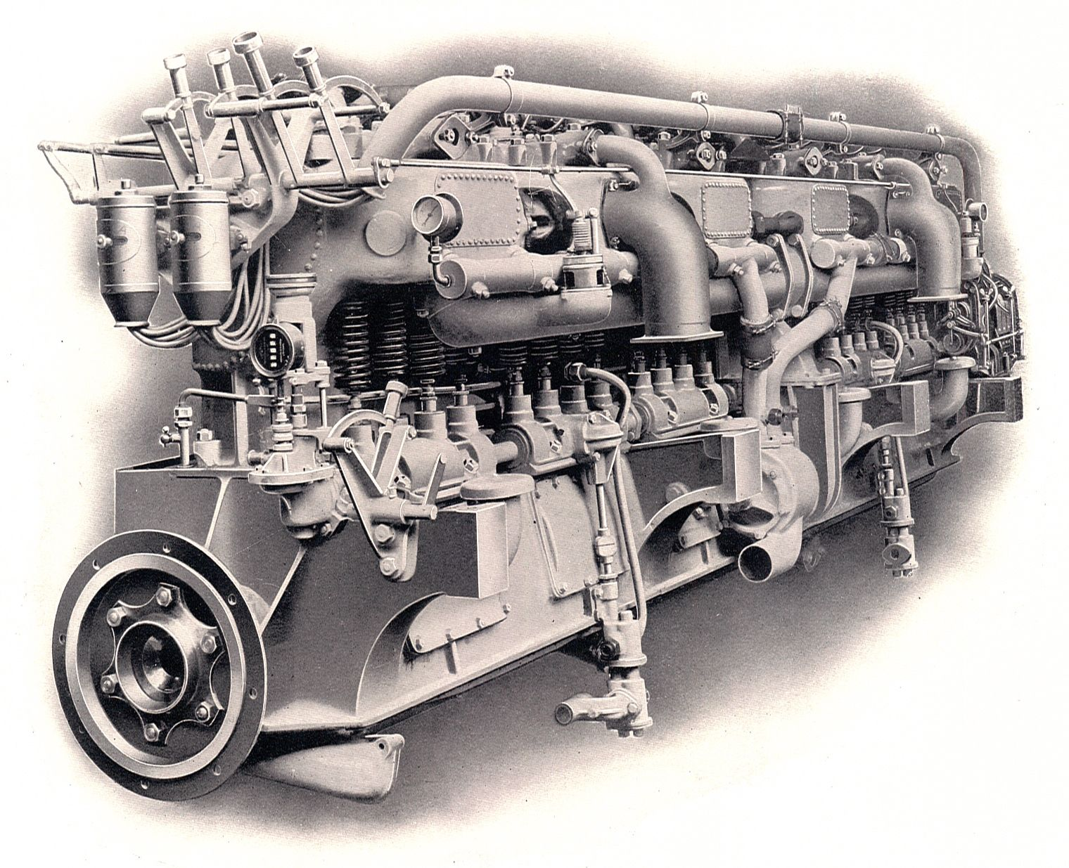 Wolseley 12 cylinder 360hp petrol or oil marine engine (Rankin Kennedy, Modern Engines, Vol III).jpg